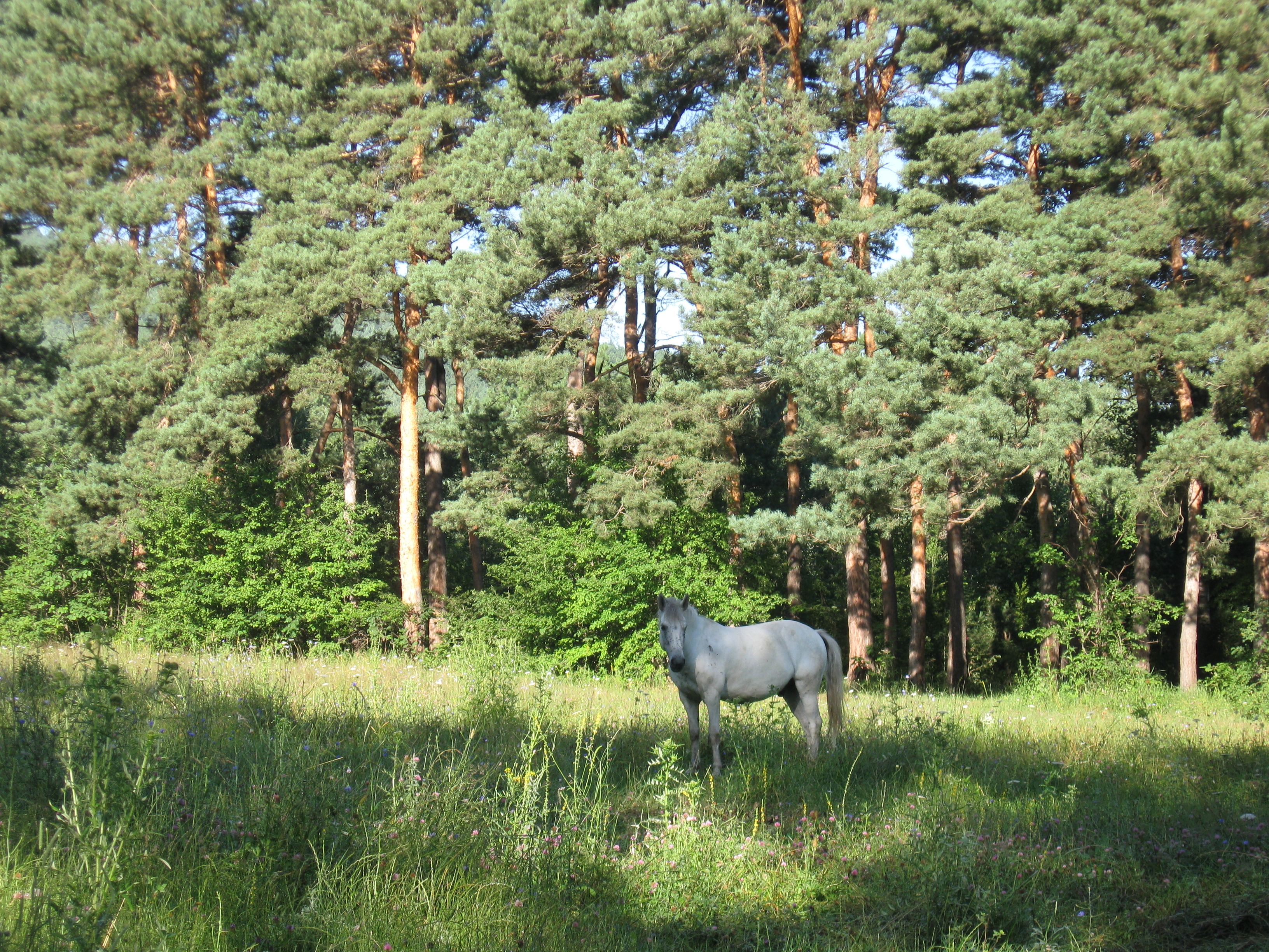 Ստեփանավանի անտառներում